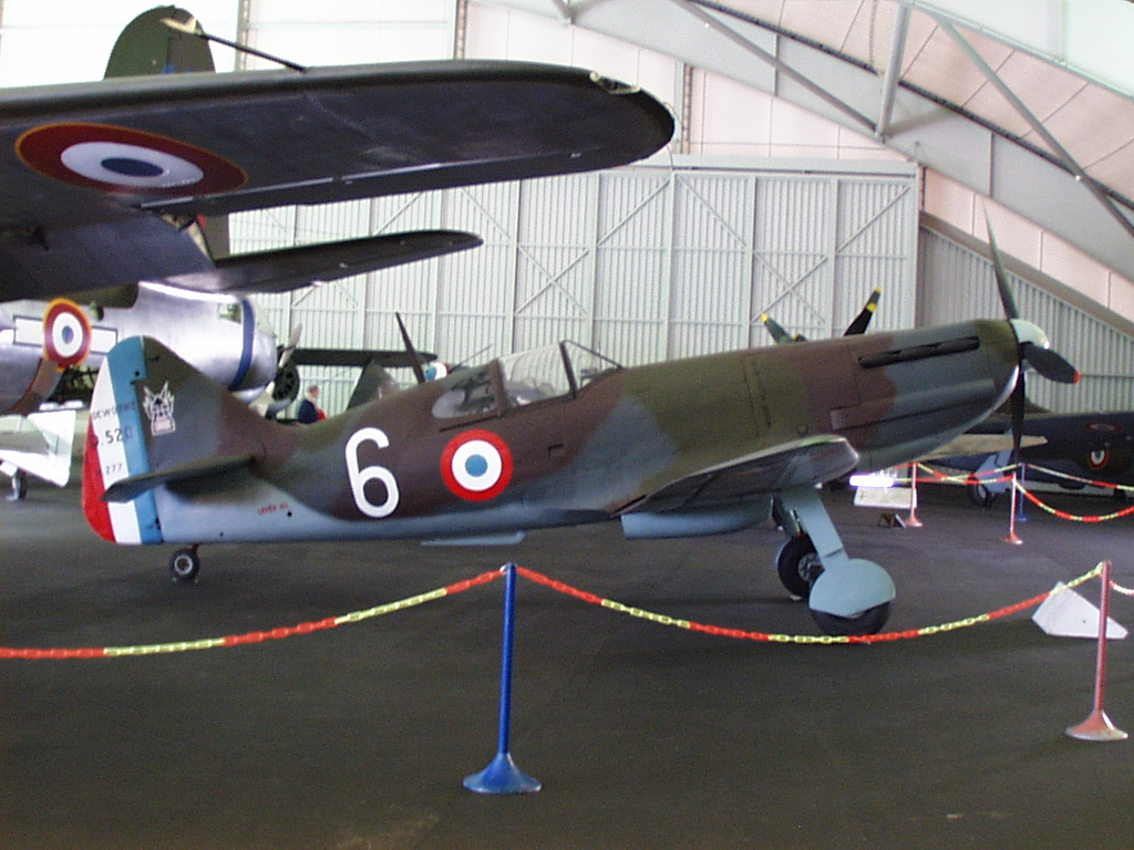 Dewoitine D.520 on display at Le Bourget